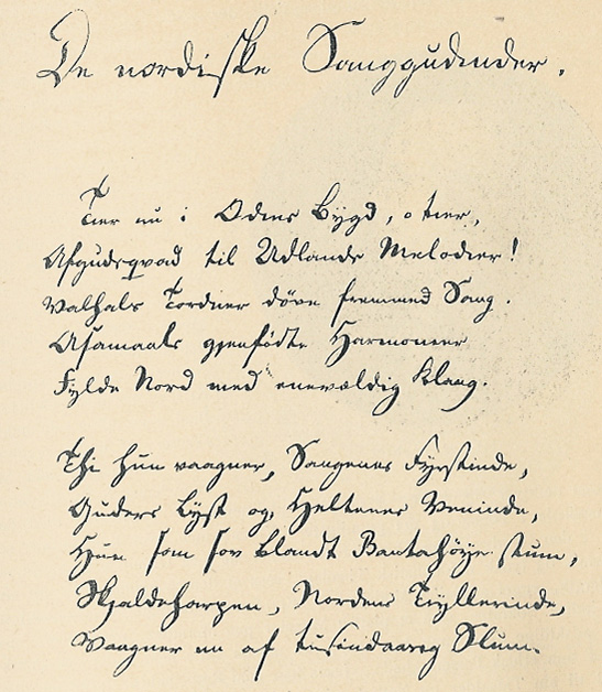 Malthe Conrad Bruuns håndskrift